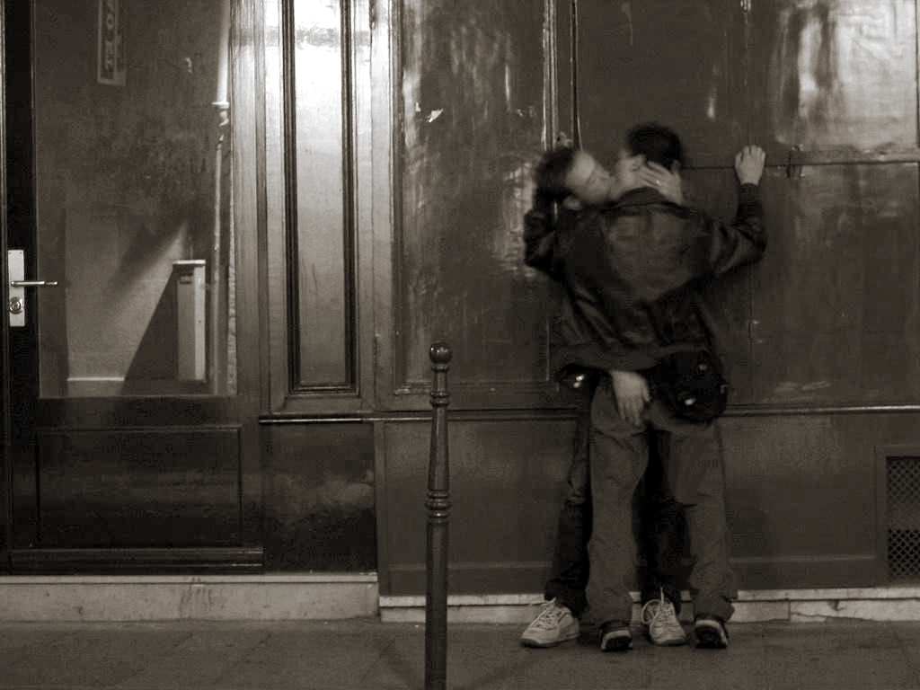 Deux hommes s'embrassant, rue vieille-du-temple, Paris.